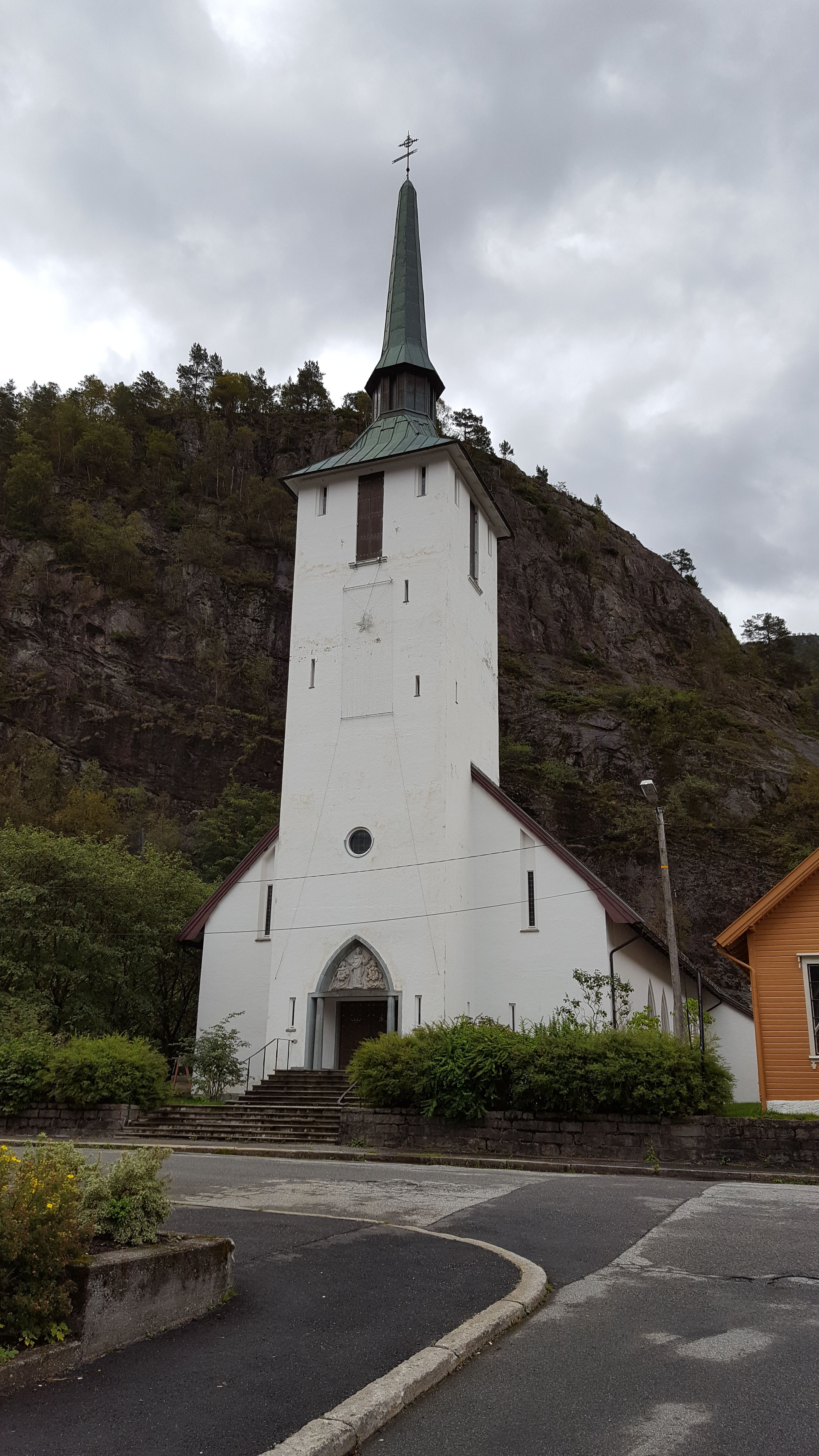 Dale Church Q11026424